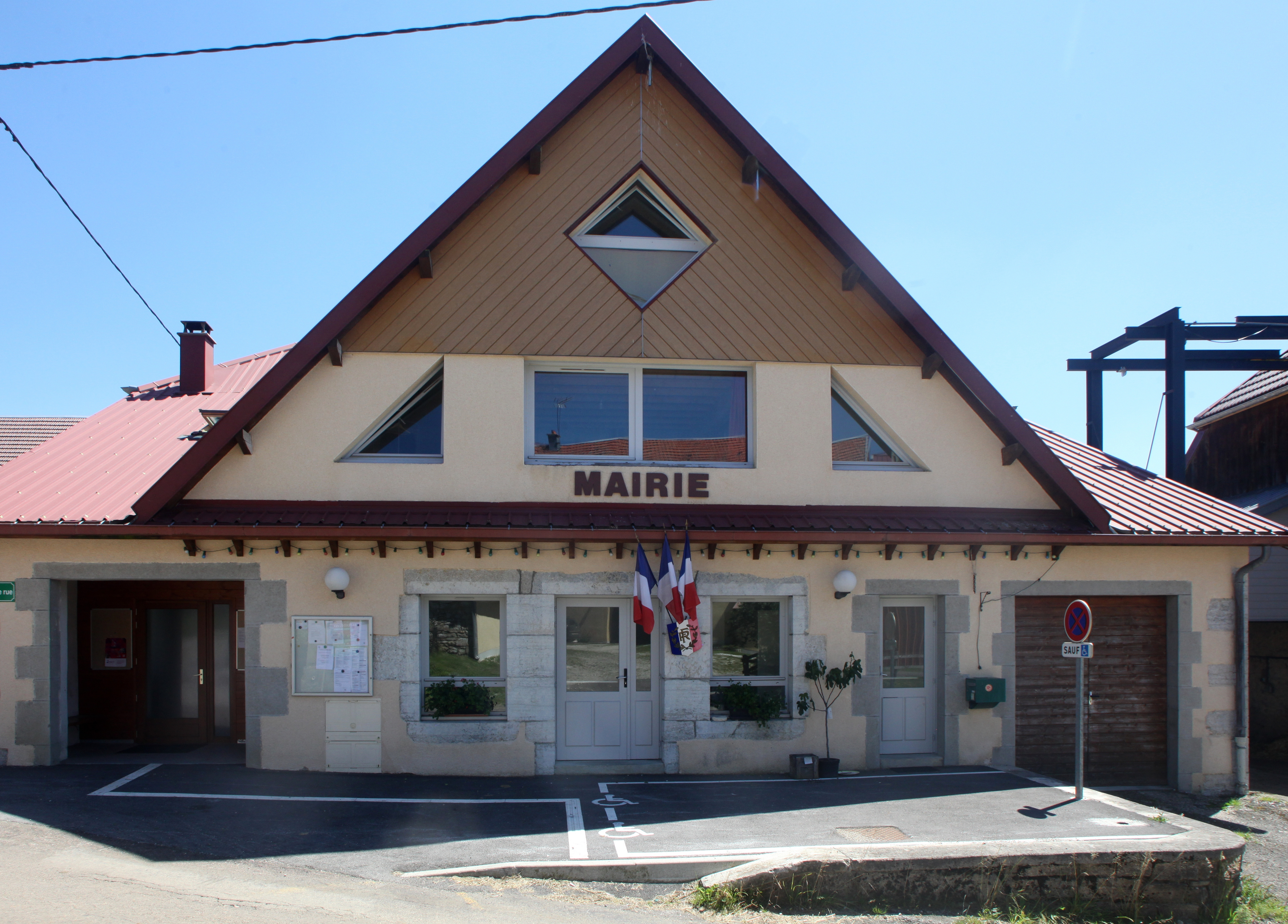 Mairie de Cerniébaud (Jura).